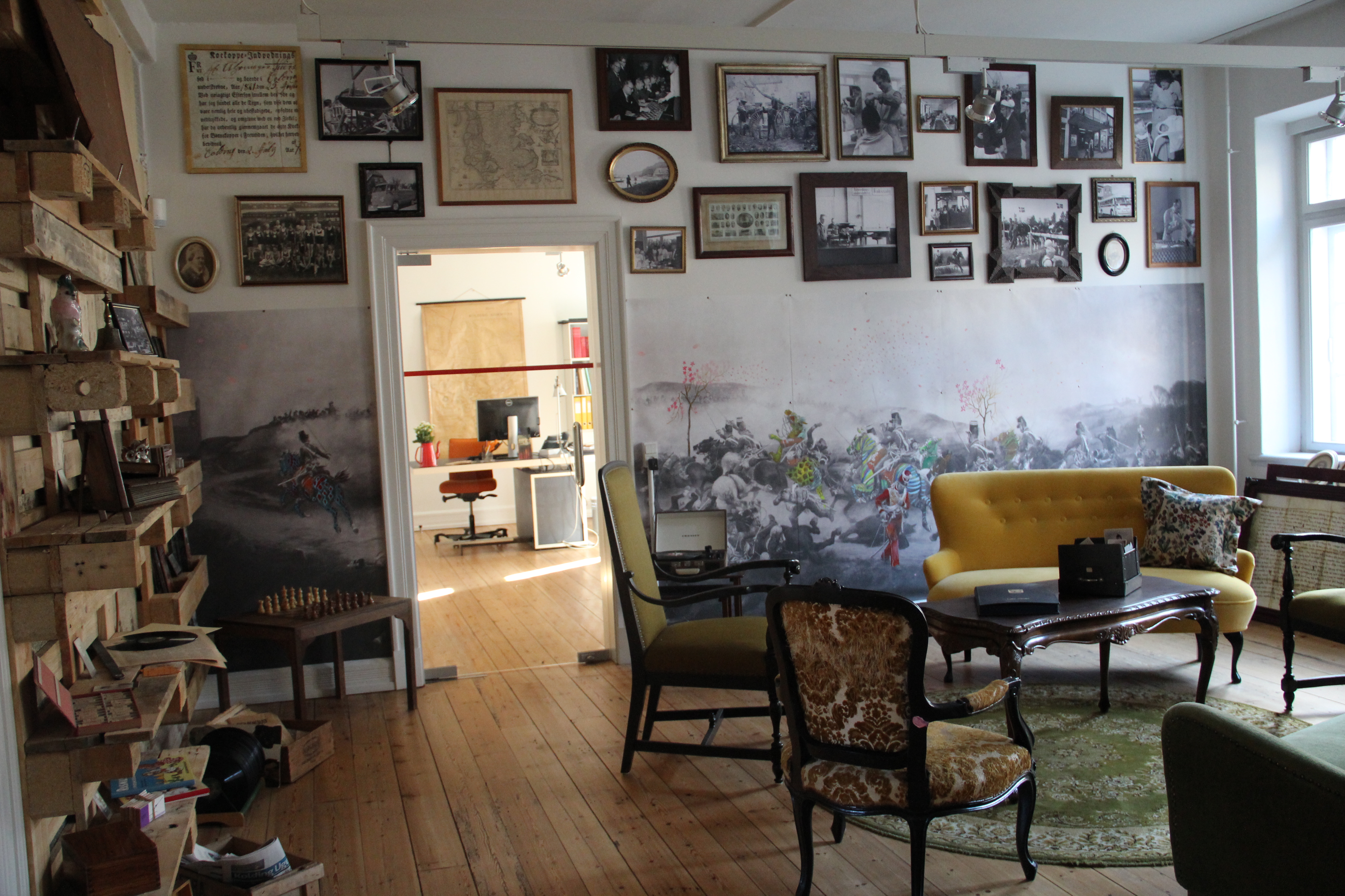 Arkivsalon